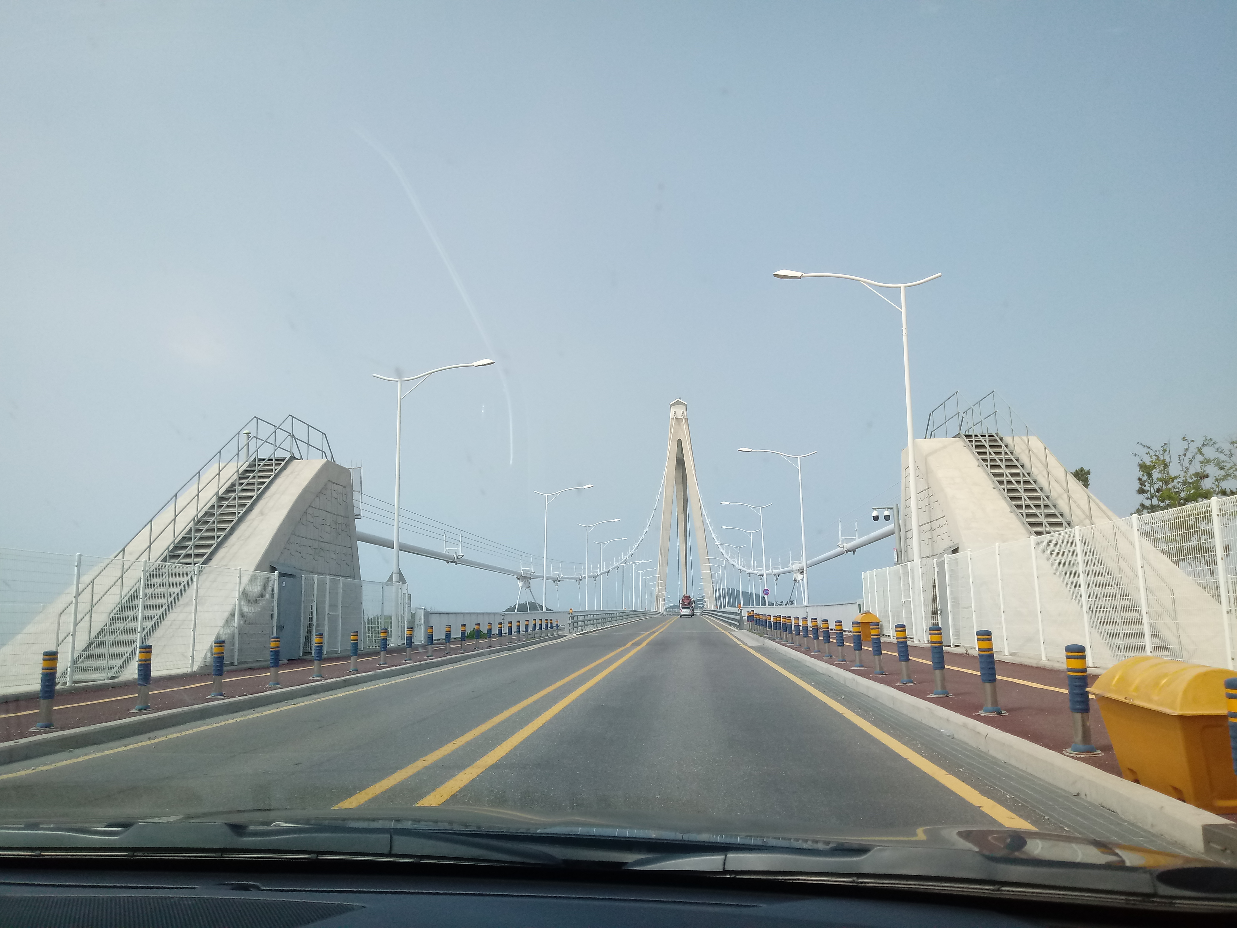 고군산대교 현수교 부분 케이블 앵커.